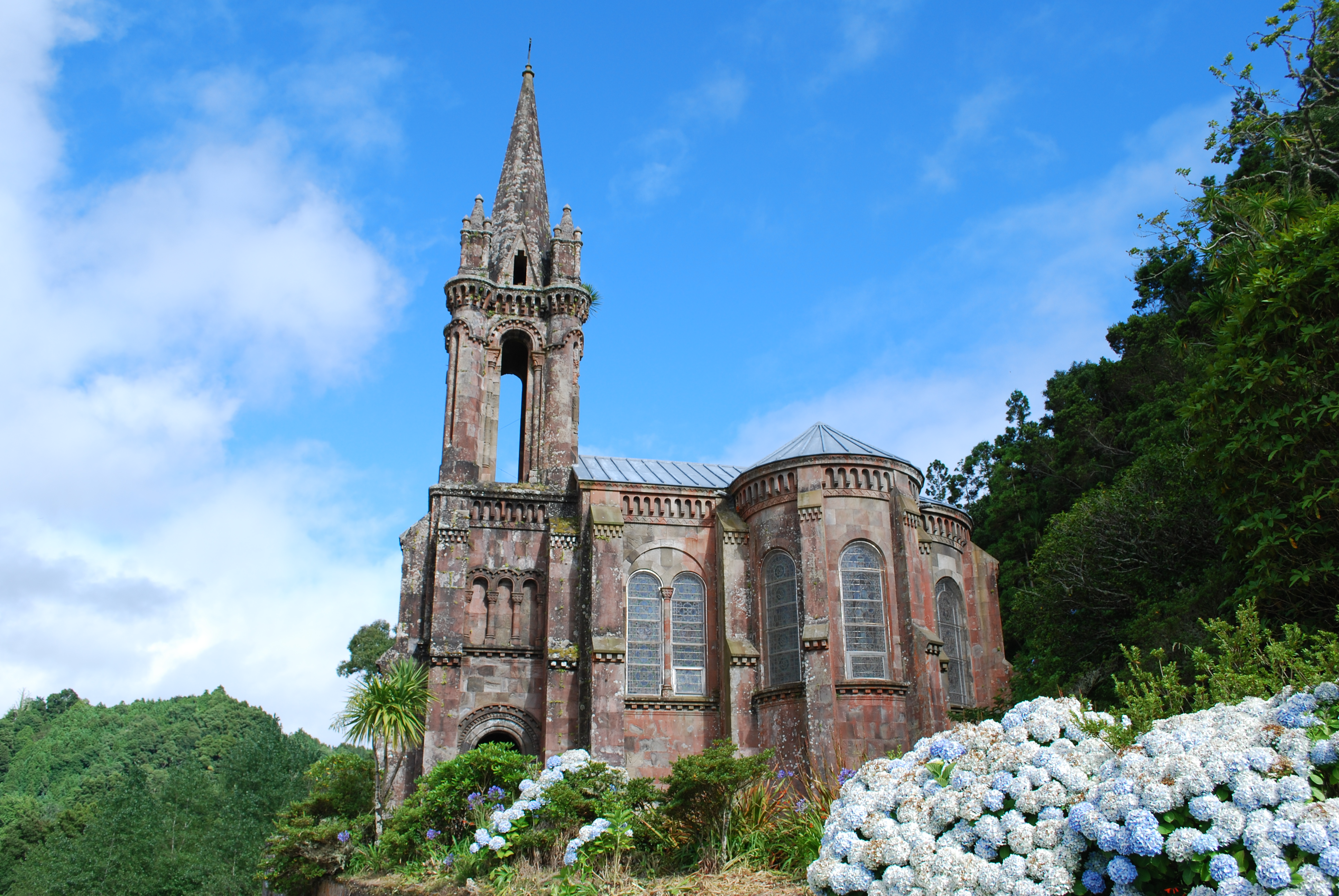 Vista geral da Capela de Nossa Senhora das Vitórias (Furnas)